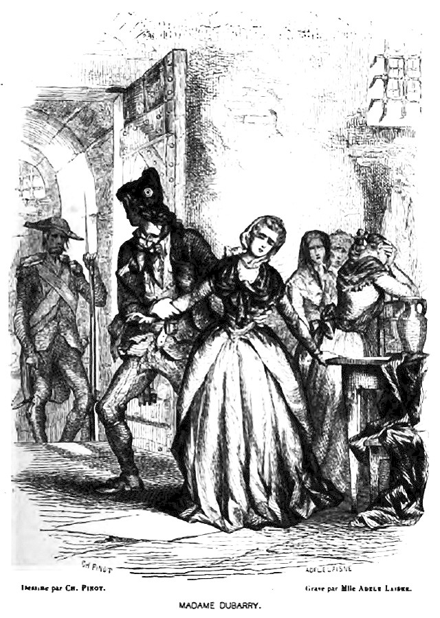 Mme Dubarry tirée hors de son cachot